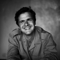 Emmanuel Werner Marie Ghislain de Mérode en 2013